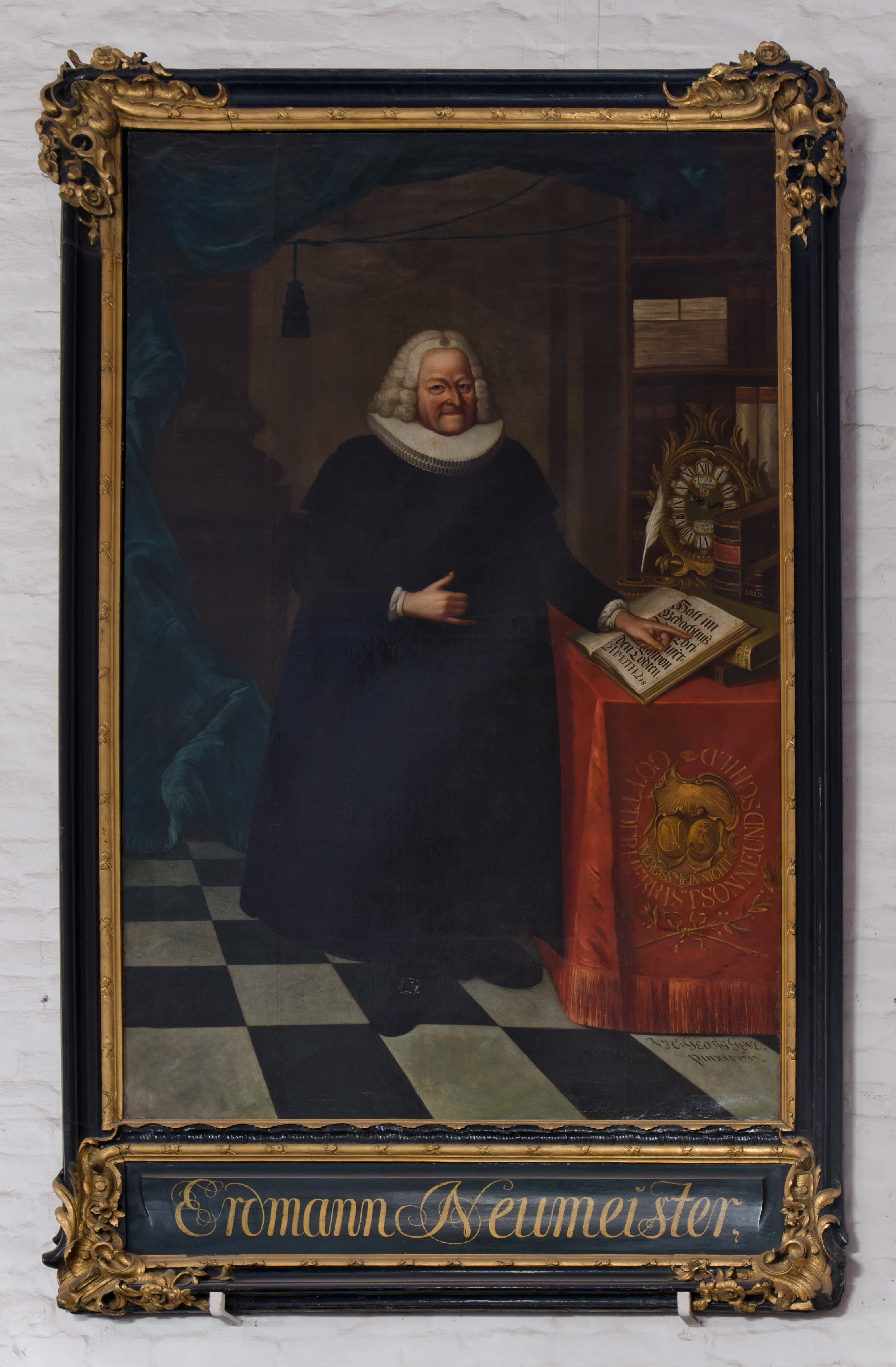 St. Jakobi Hamburg, Gemälde von Erdmann Neumeister